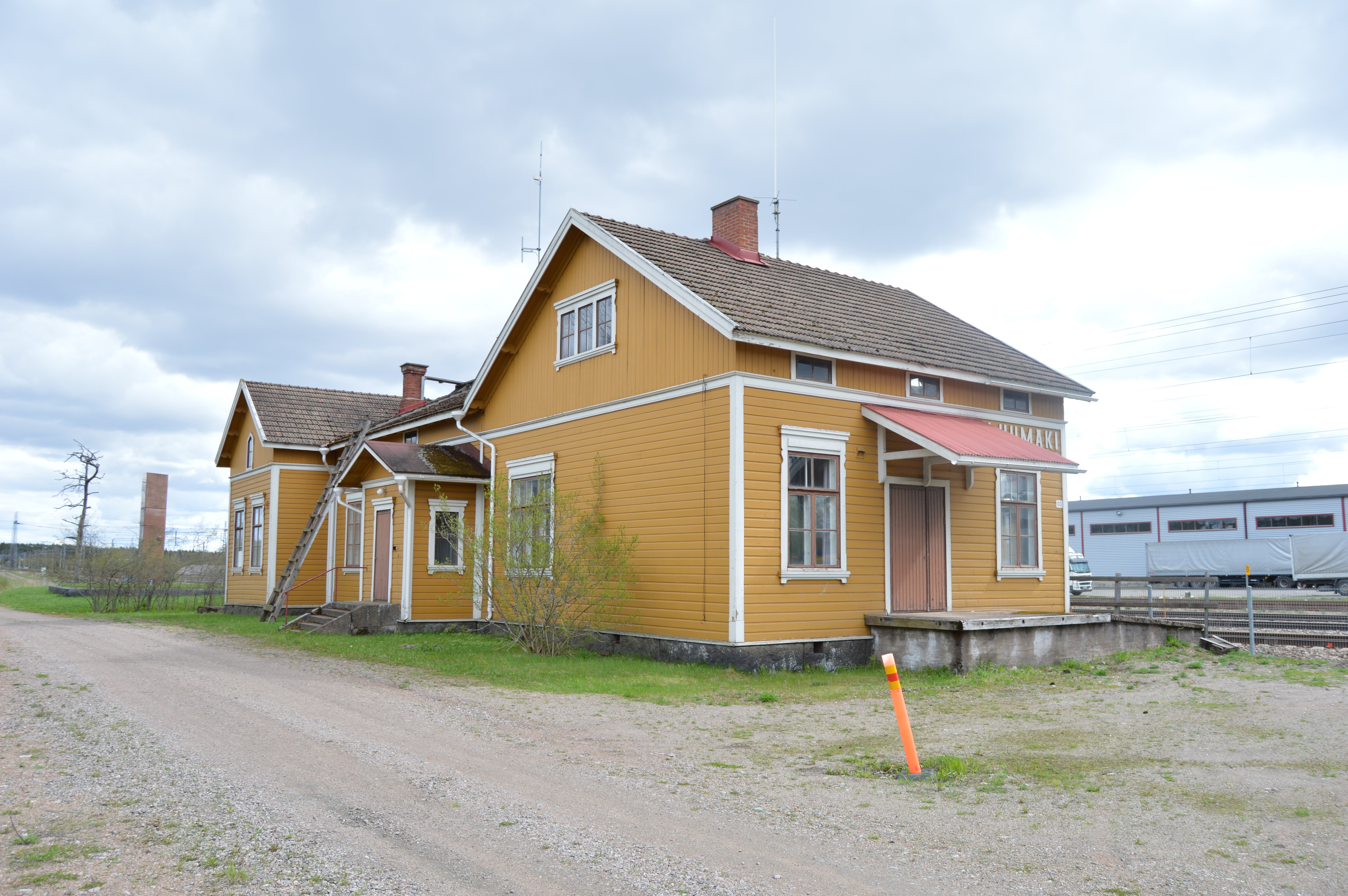 Luumäen rautatieasema